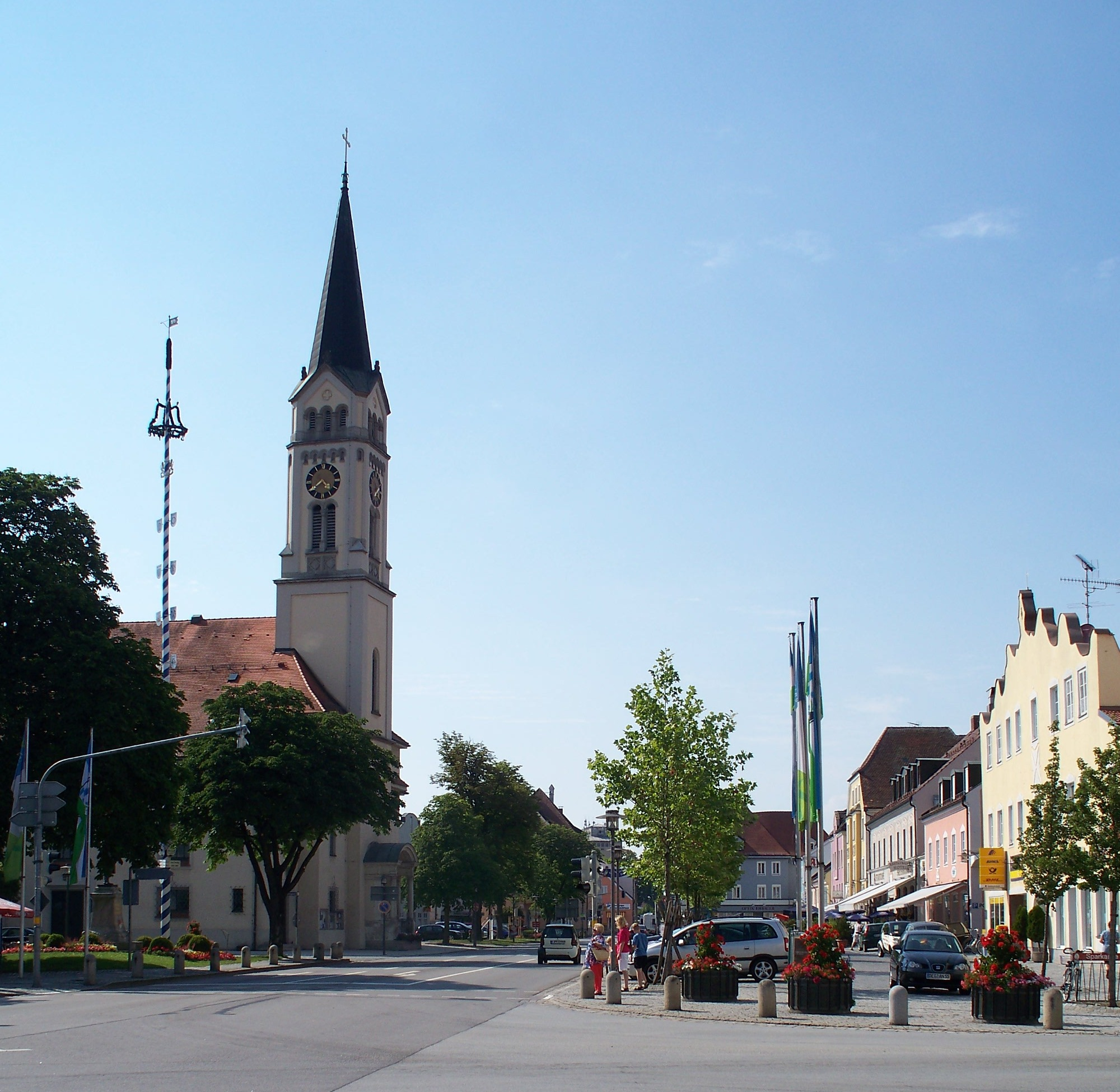 Plattling: Kirche St. Magdalena und Teil des Stadtplatzes.